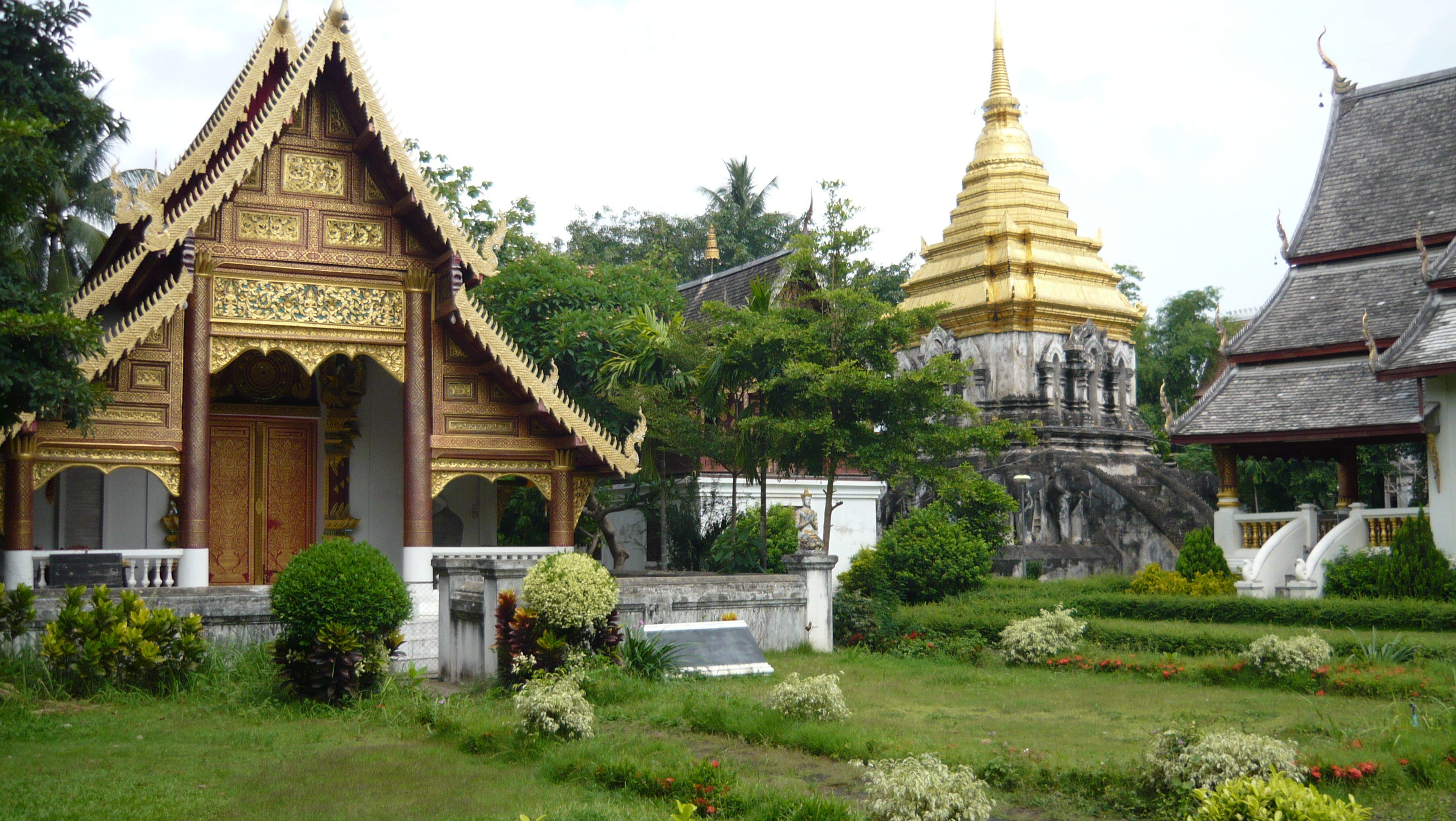 Chiang Mai, Wat Chiang Man